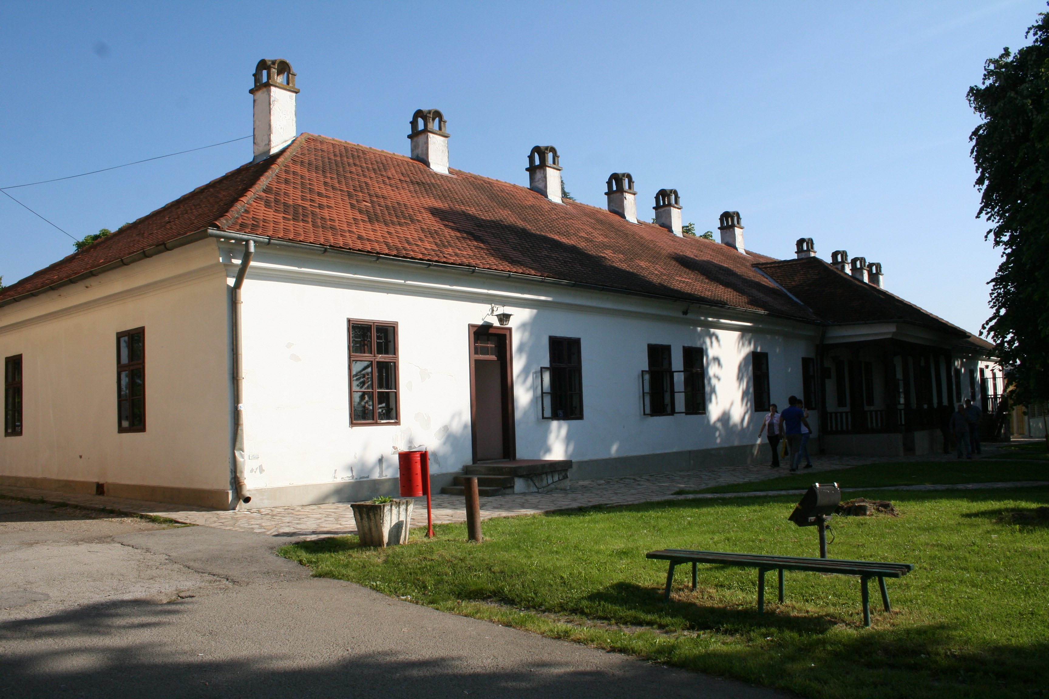 Vladimirci, konak